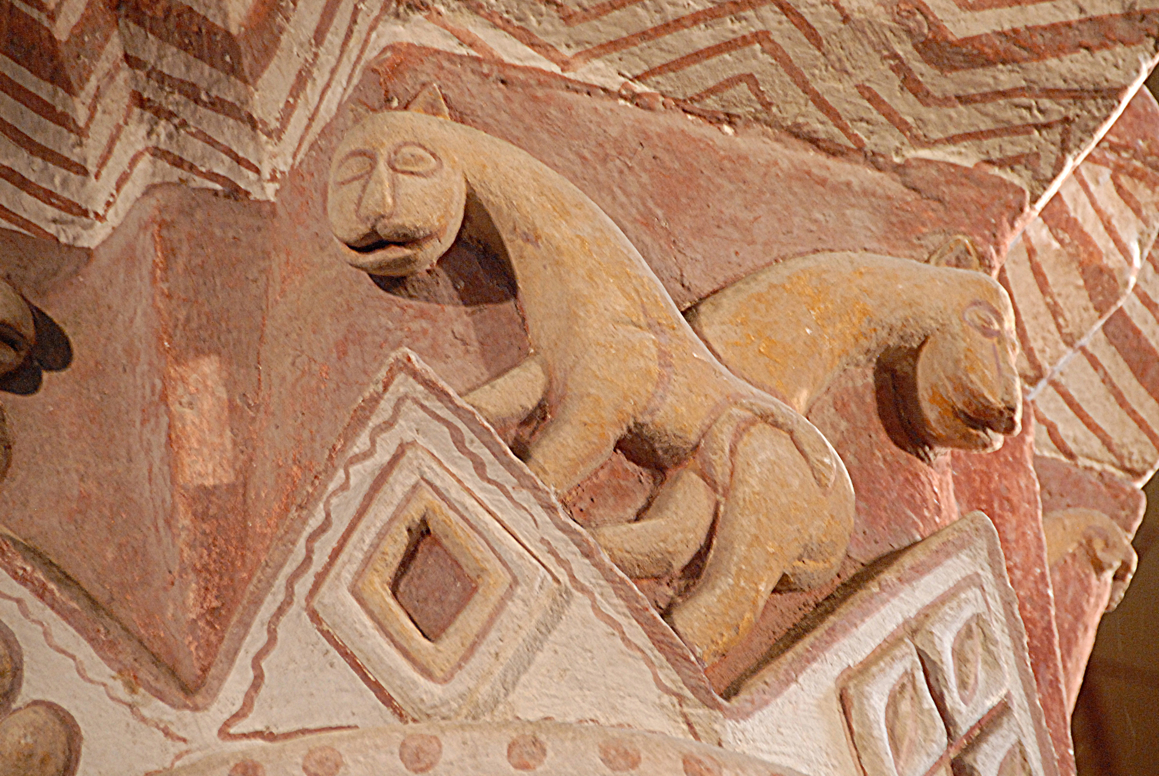 Civaux, Kirche, Kapitell, Pferde